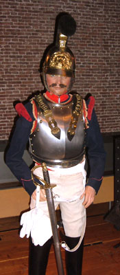 Kürassier